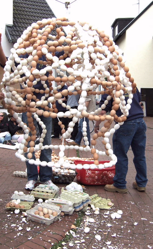 Eierkrone – kurz vor der Fertigstellung – für den Bonner Stadtteil Küdinghoven